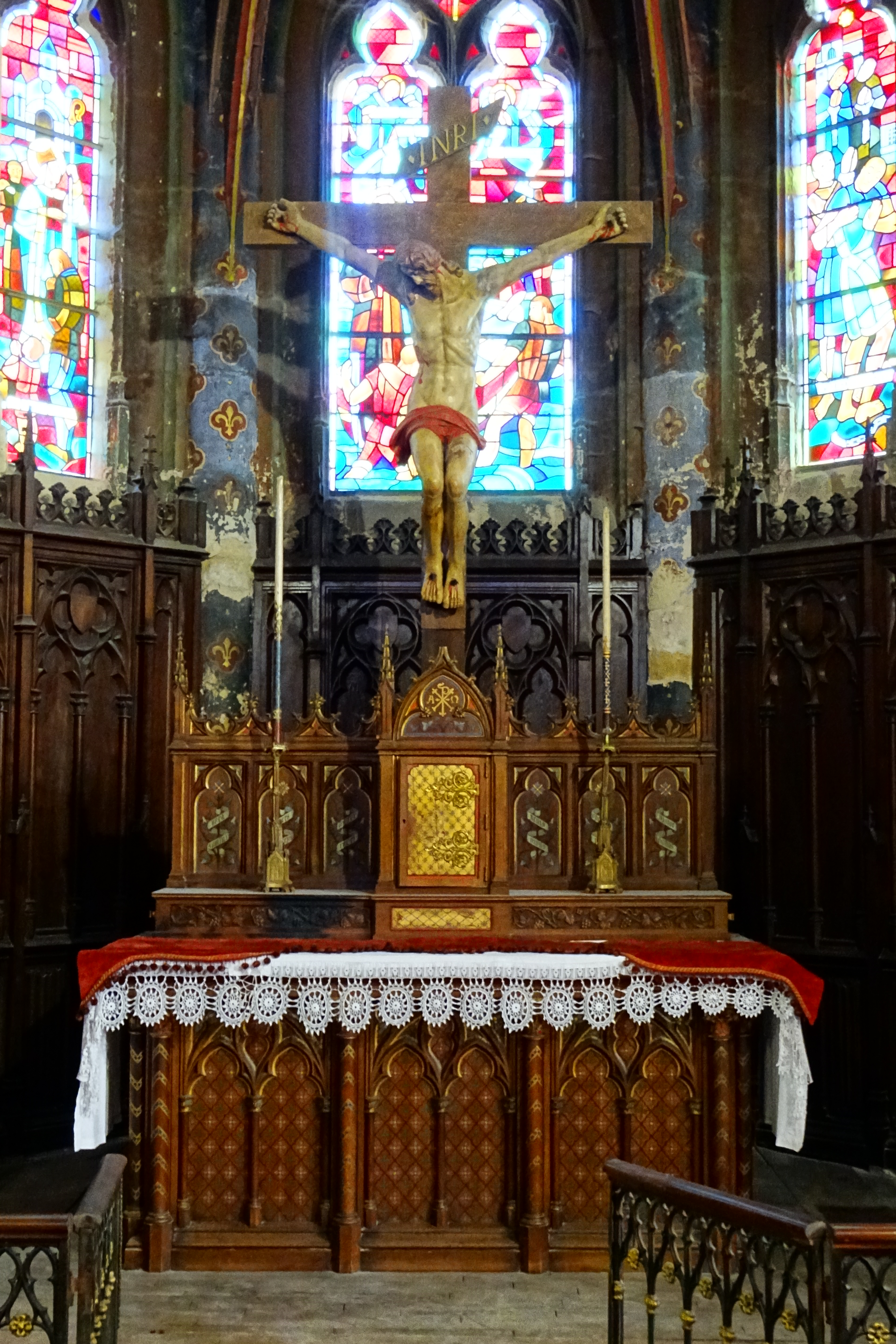 Chœur, maître-autel et tabernacle, par Poussièlgue-Rusand, 1875. Le prix était de 2 000 francs.